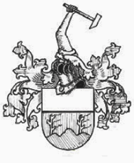 Wappen der Prentels, verliehen durch Friedrich V. (Pfalz) am 26. Januar 1597